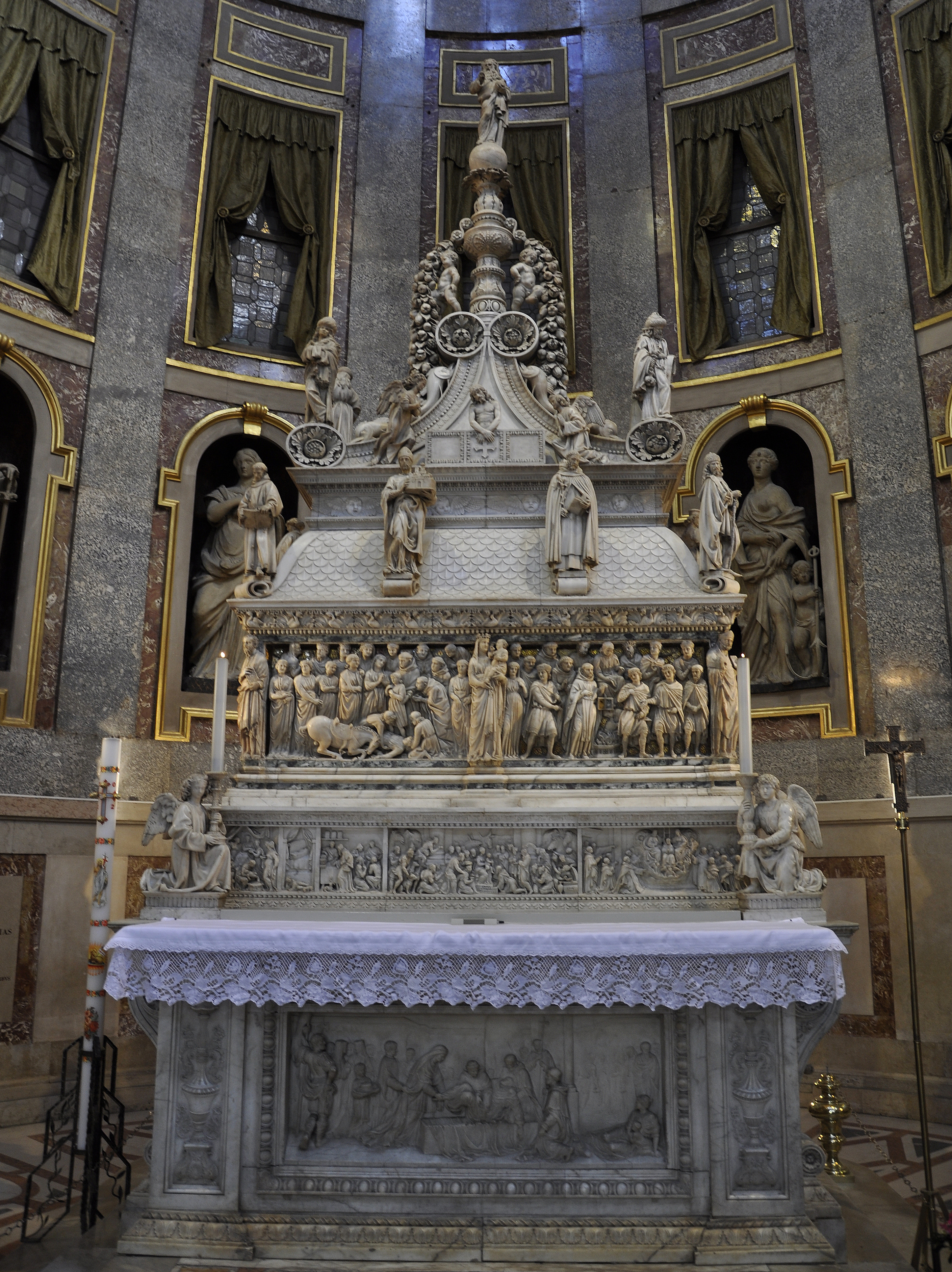 Bologna, Italië - basilica di San Domenico - schrijn van Dominicus